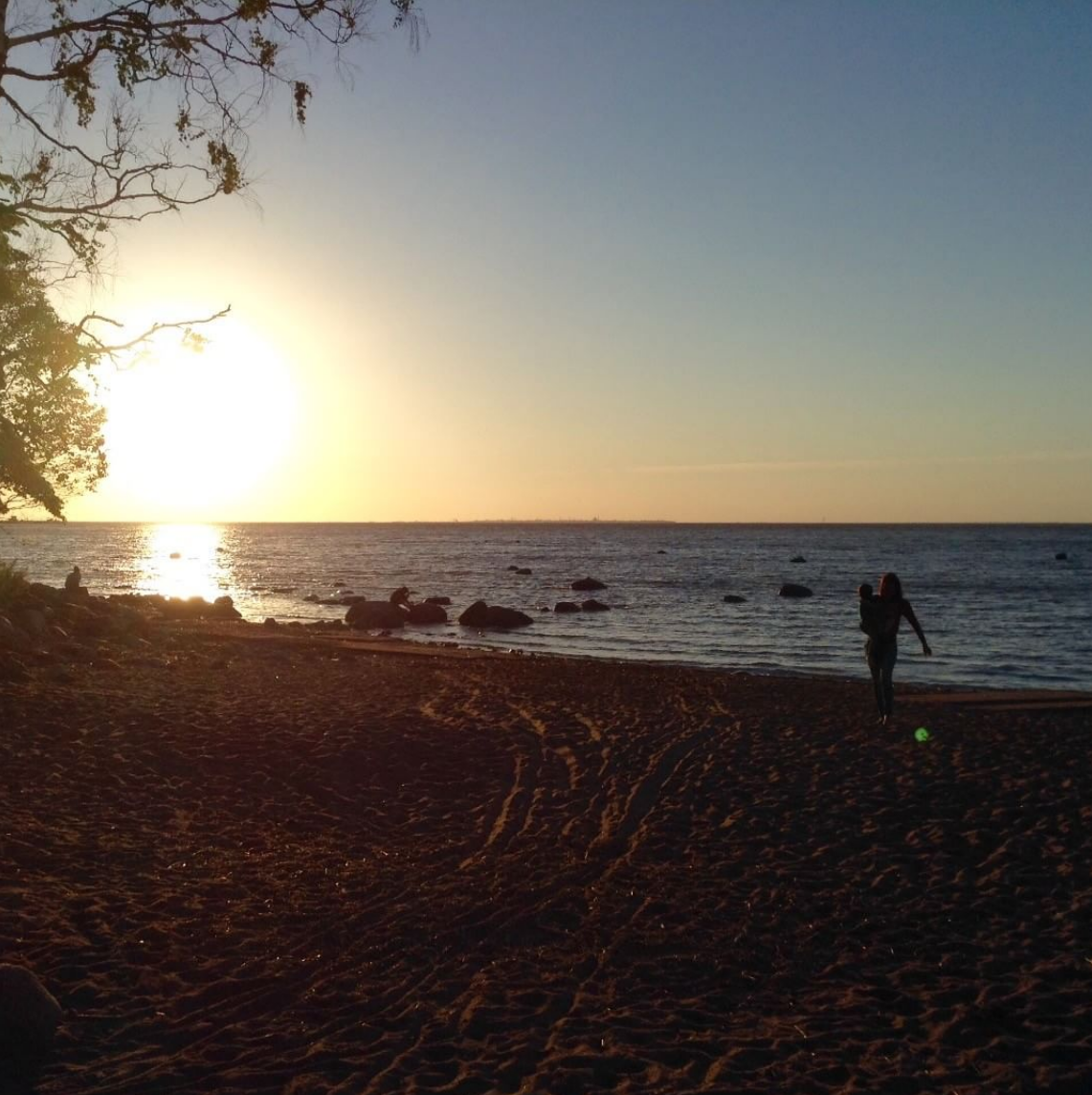 Sunset in the Gulf of Finland